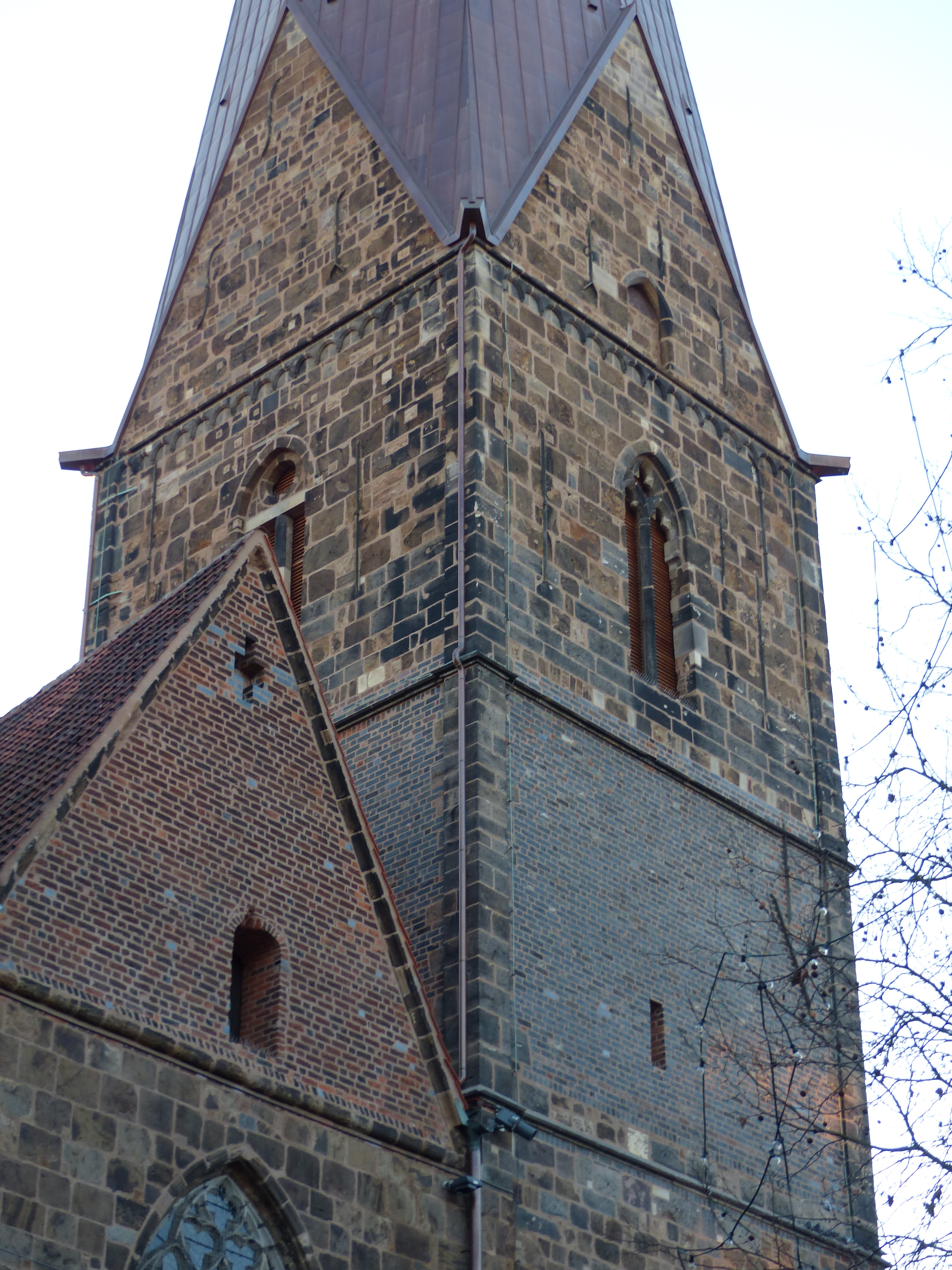 Liebfrauenkirche in Bremen, Nordturm von Osten, Turmgeschoss in Höhe der Kirchschiffsdächer an zwei Seiten aus blaugrauem Backstein